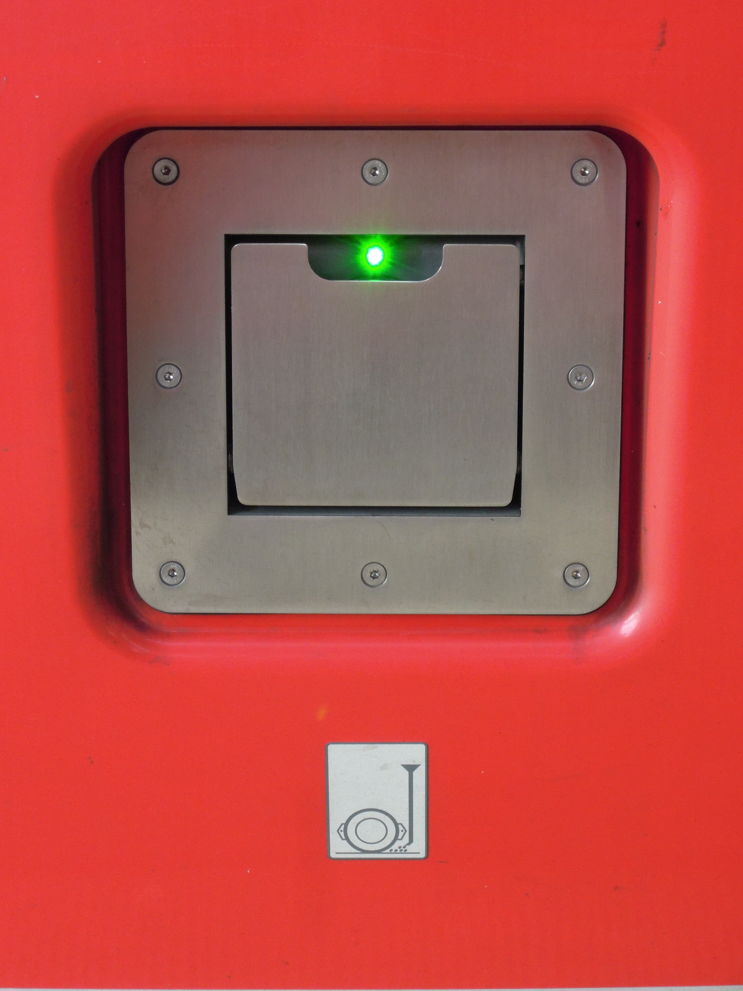 Sandeinfüllstutzen eines Triebwagens der DB-Baureihe 442